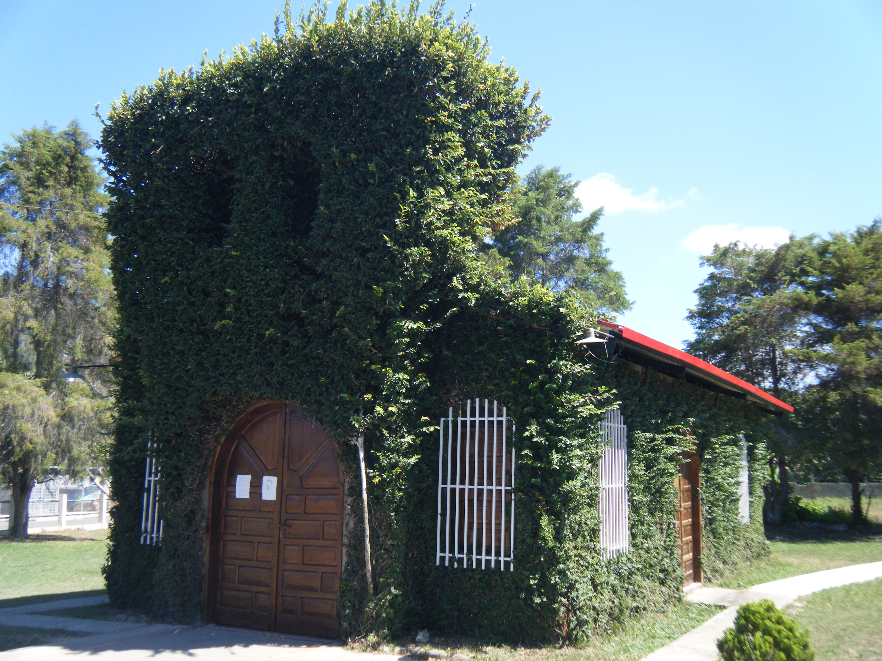 Iglesia San Agustín